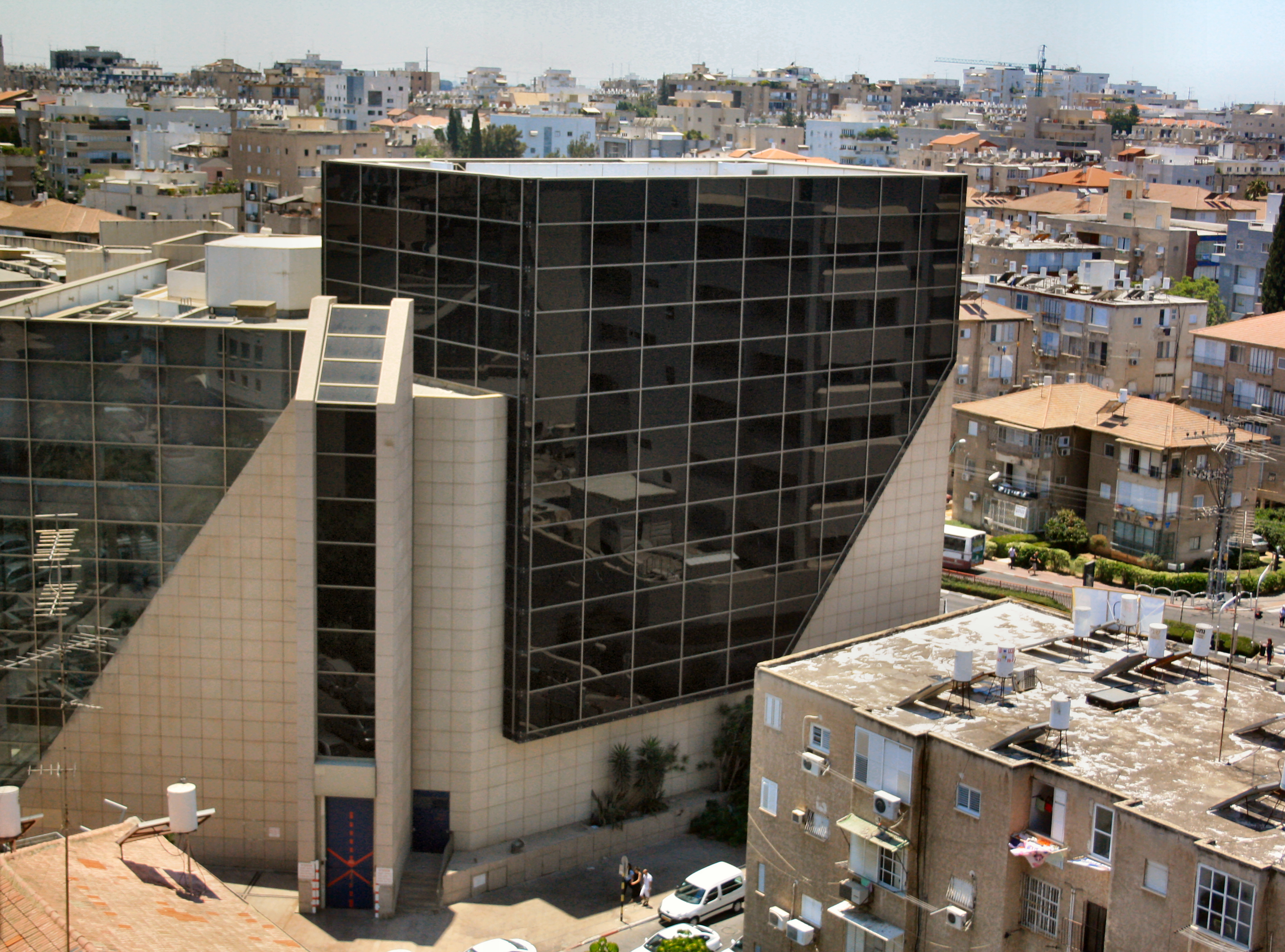 היכל התרבות ראשון לציון